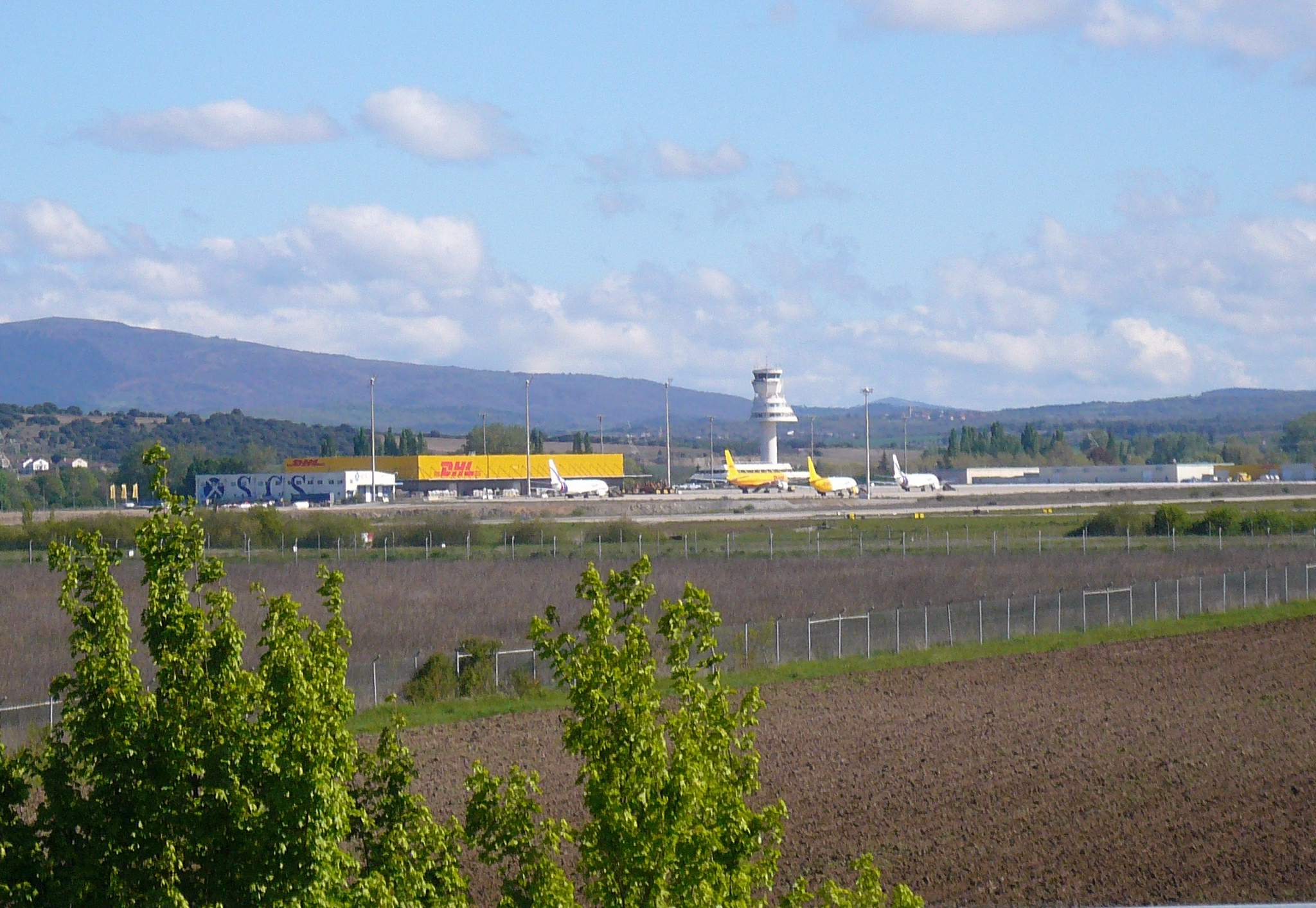 Vista del Aeropuerto de Foronda desde Asteguieta (Vitoria)